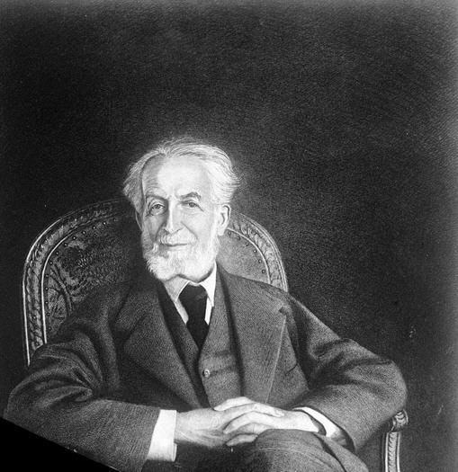 הברון אדמונד דה רוטשילד (1934 - 1845) .